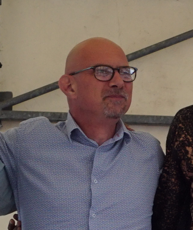 en concert à Reims.